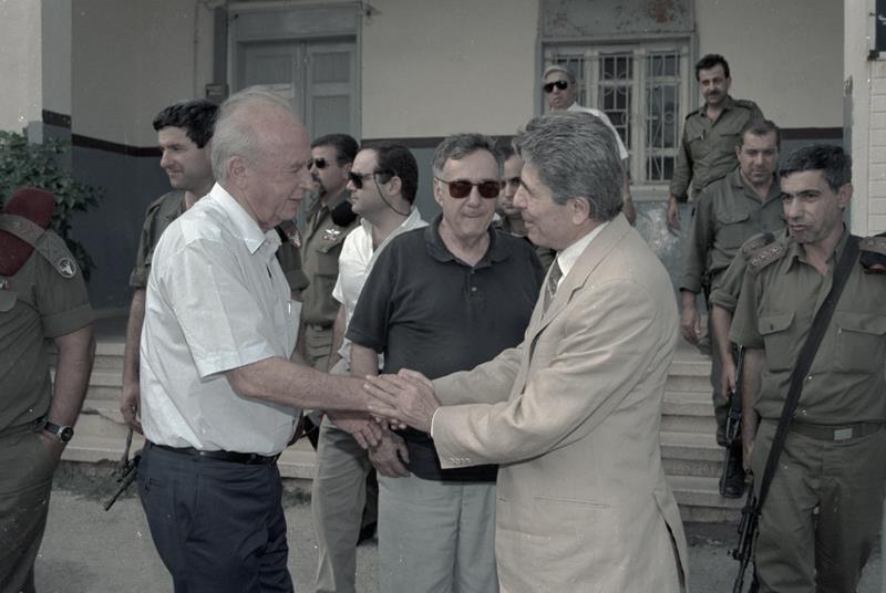 ביקור שר הביטחון ורוה"מ בפיקוד הצפון. לוחצים ידיים מימין: אנטואן לאחד, משמאל: יצחק רבין. מאחוריהם: אורי לוברני.